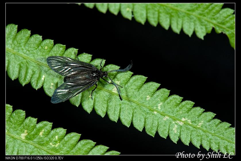 Illiberis translucida